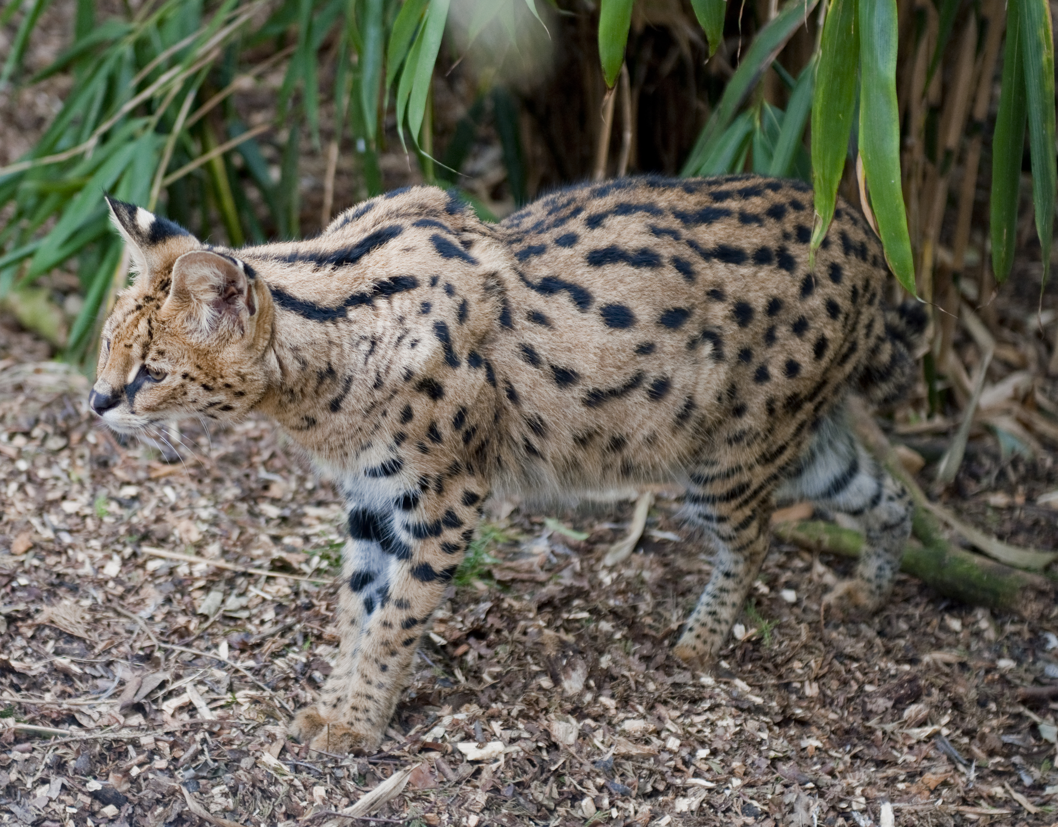 Un Serval (Leptailurus serval) au Cat Survival Trust.